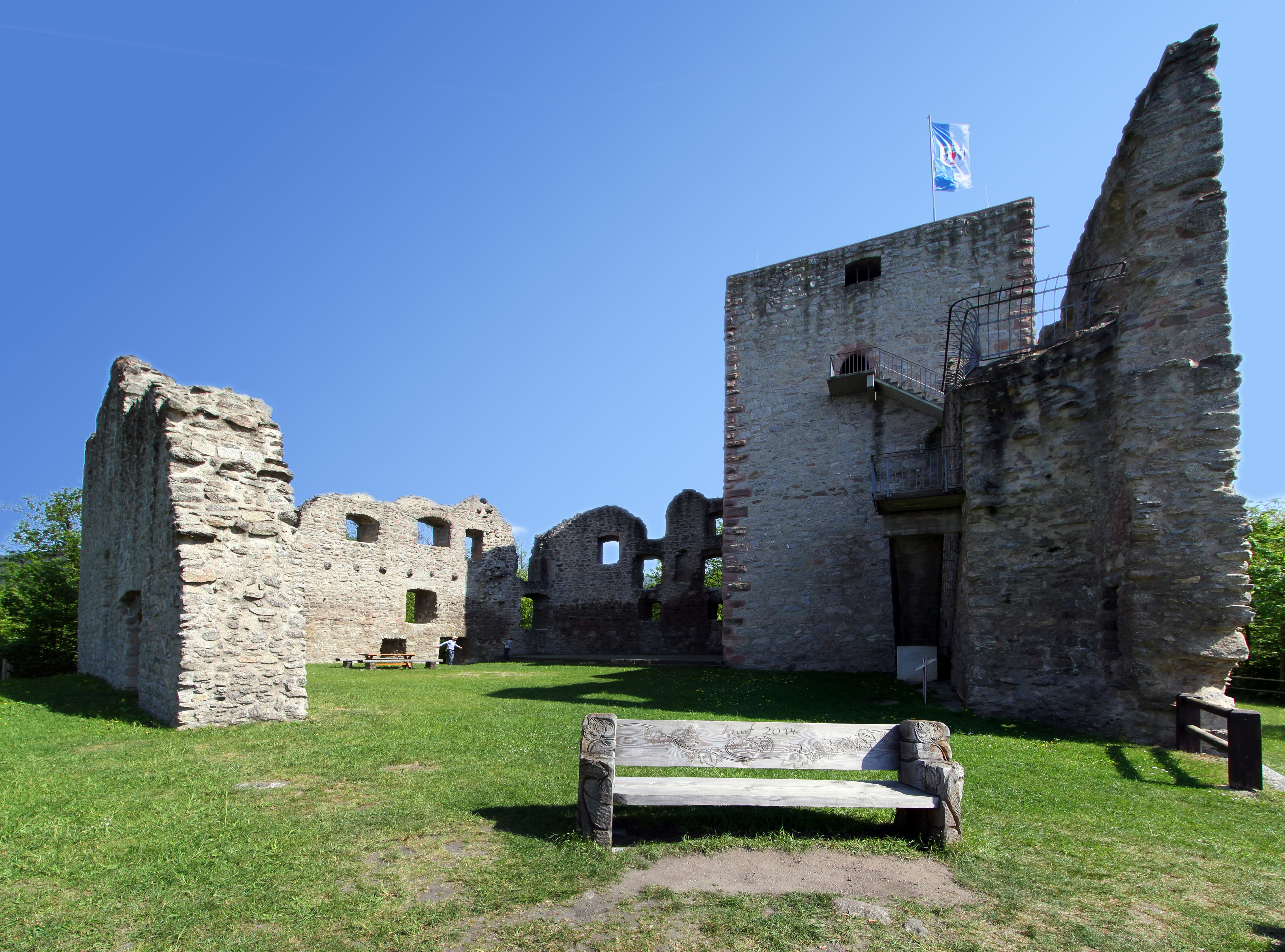 Burg Neu-Windeck in Lauf